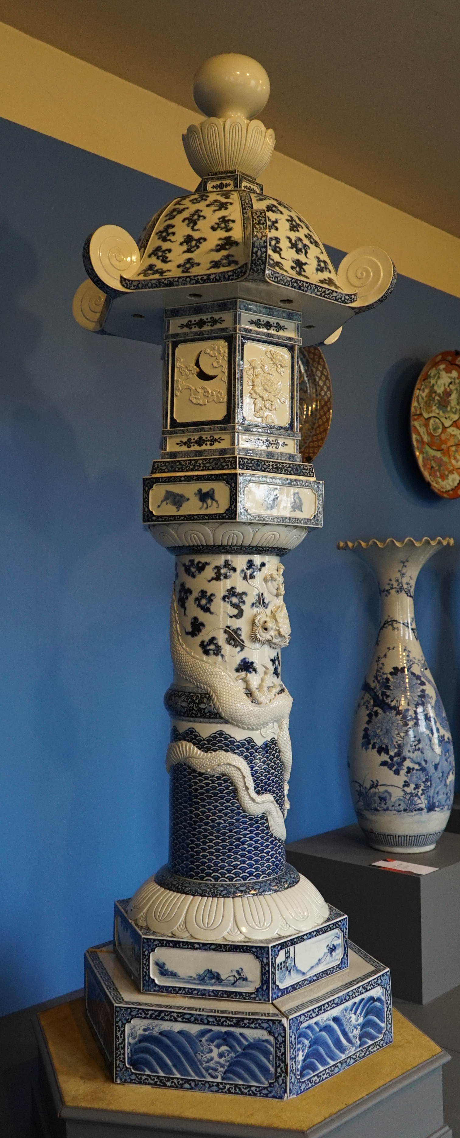 exposition temporaire au musée de Reims.